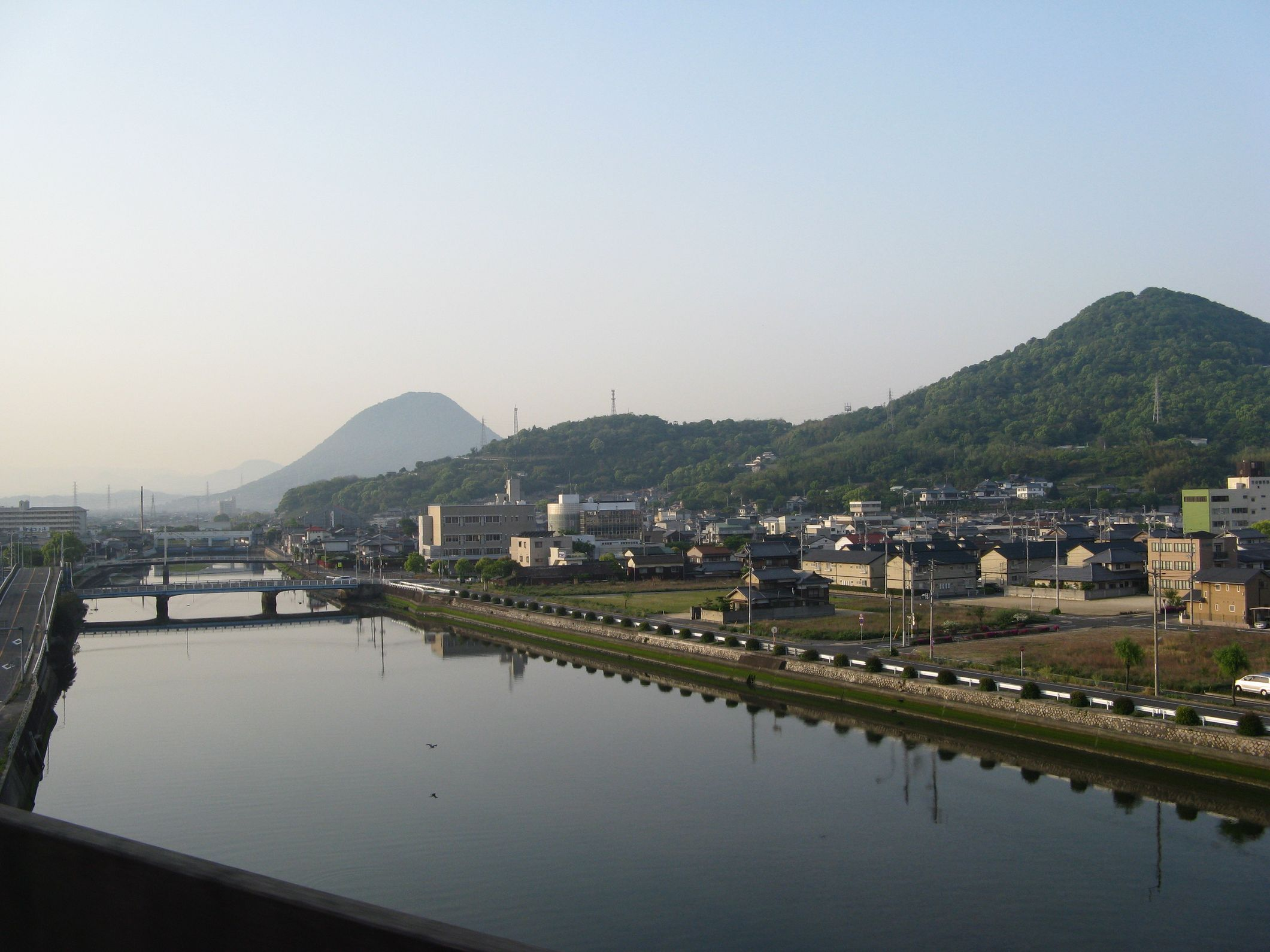 大束川 予讃線 坂出～宇多津間（綾歌郡宇多津町）から南望 中ほどに霞む山は飯野山